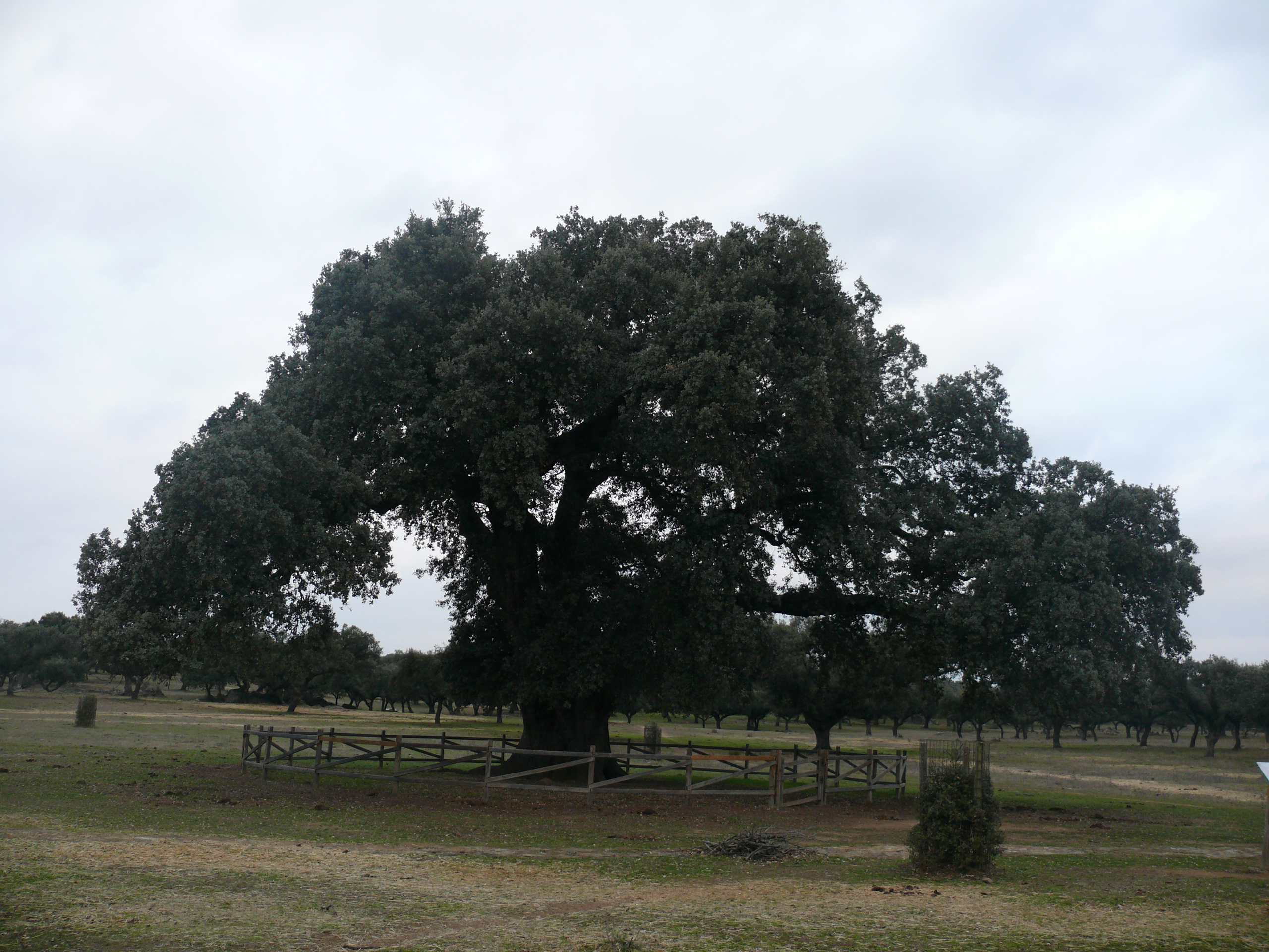 Monumental encina de mas de 800 años de vida existente en Zarza de Montánchez.